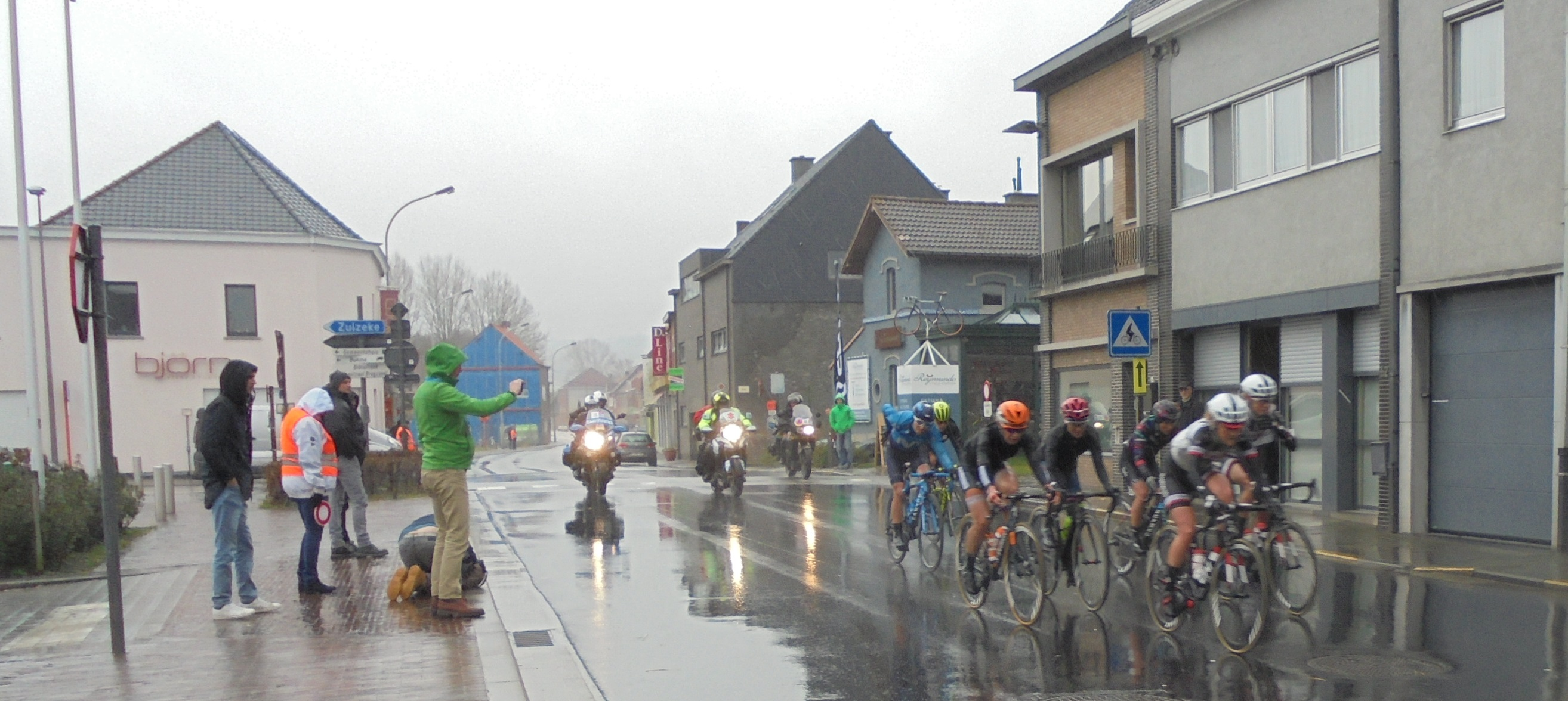 De doortocht van de dames in Dwars door Vlaanderen bij hun doortocht in Berchem - ter hoogte van het voormalige stationsplein - Berchem - Kluisbergen - Oost-Vlaanderen - België